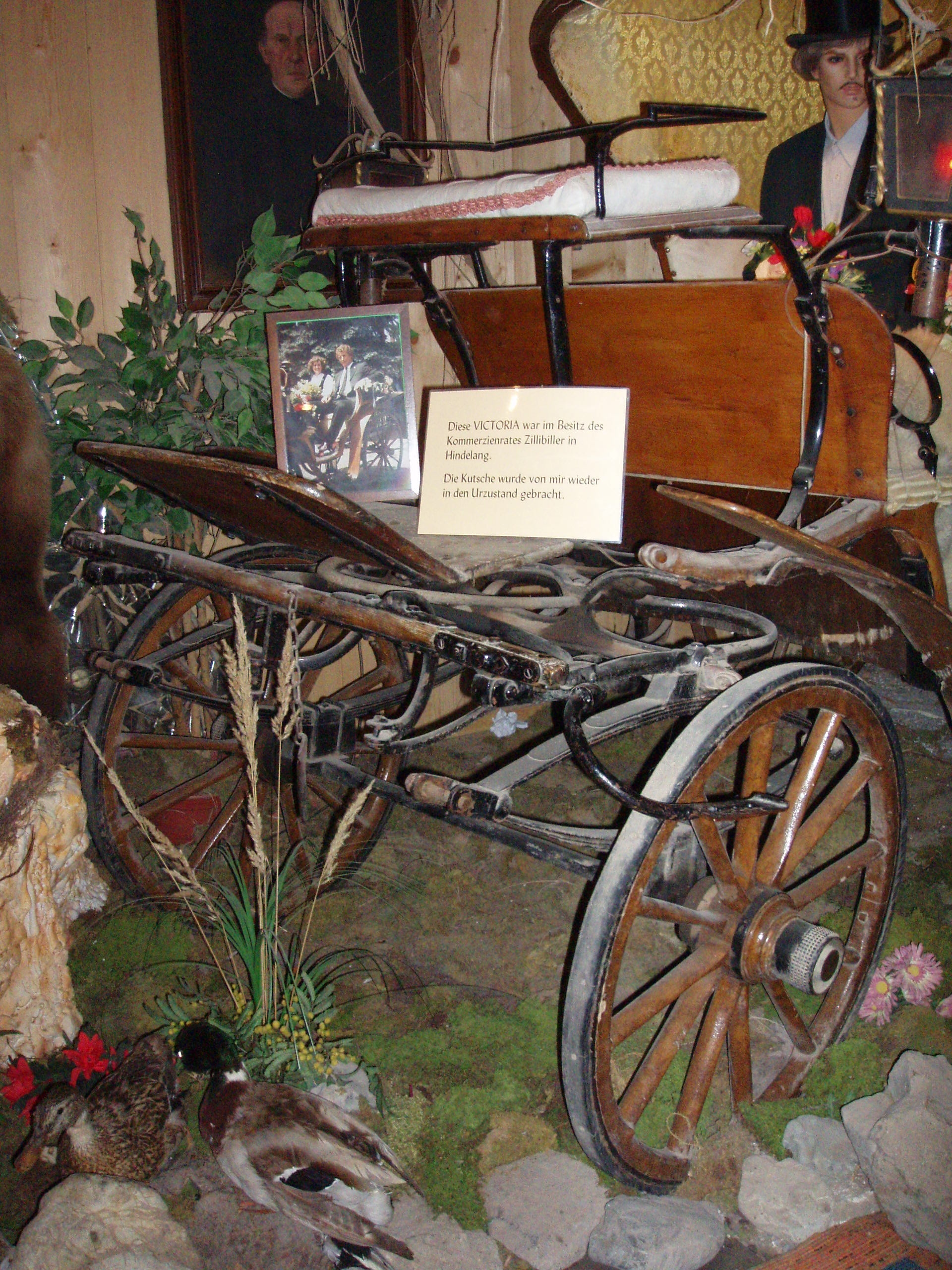 Viktoria aus dem Besitz Gottfried Zillibillers